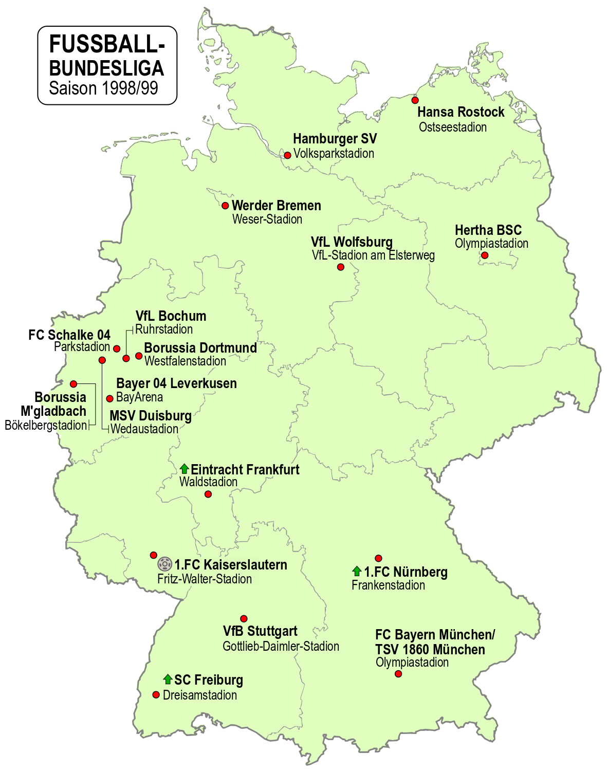 Karte der Vereine der Fussball-Bundesliga-Saison 1998/99